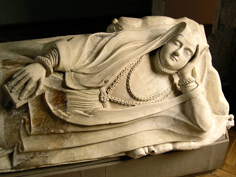 Olesko Castle